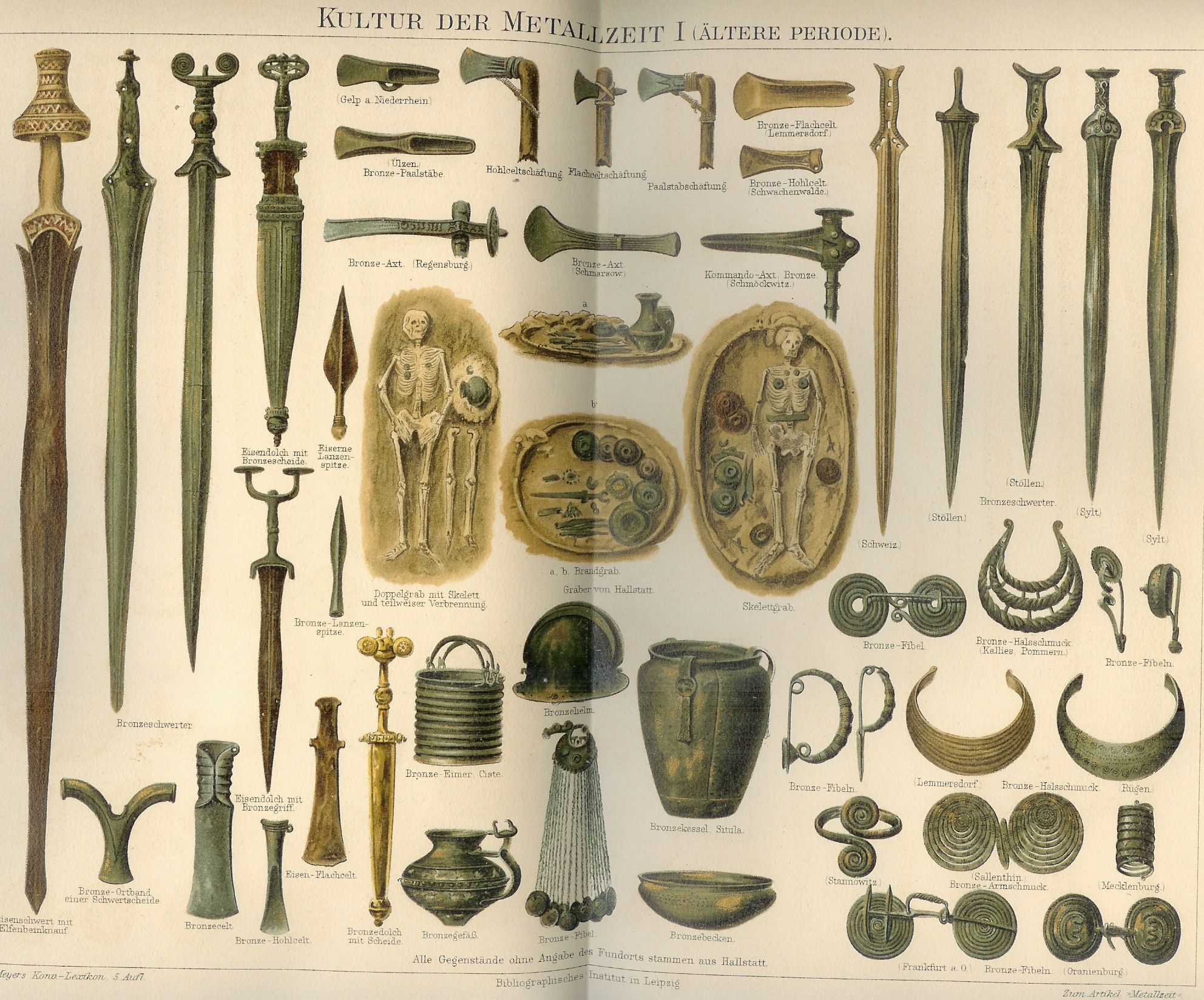 Hallstattfunde der Hallstattkultur